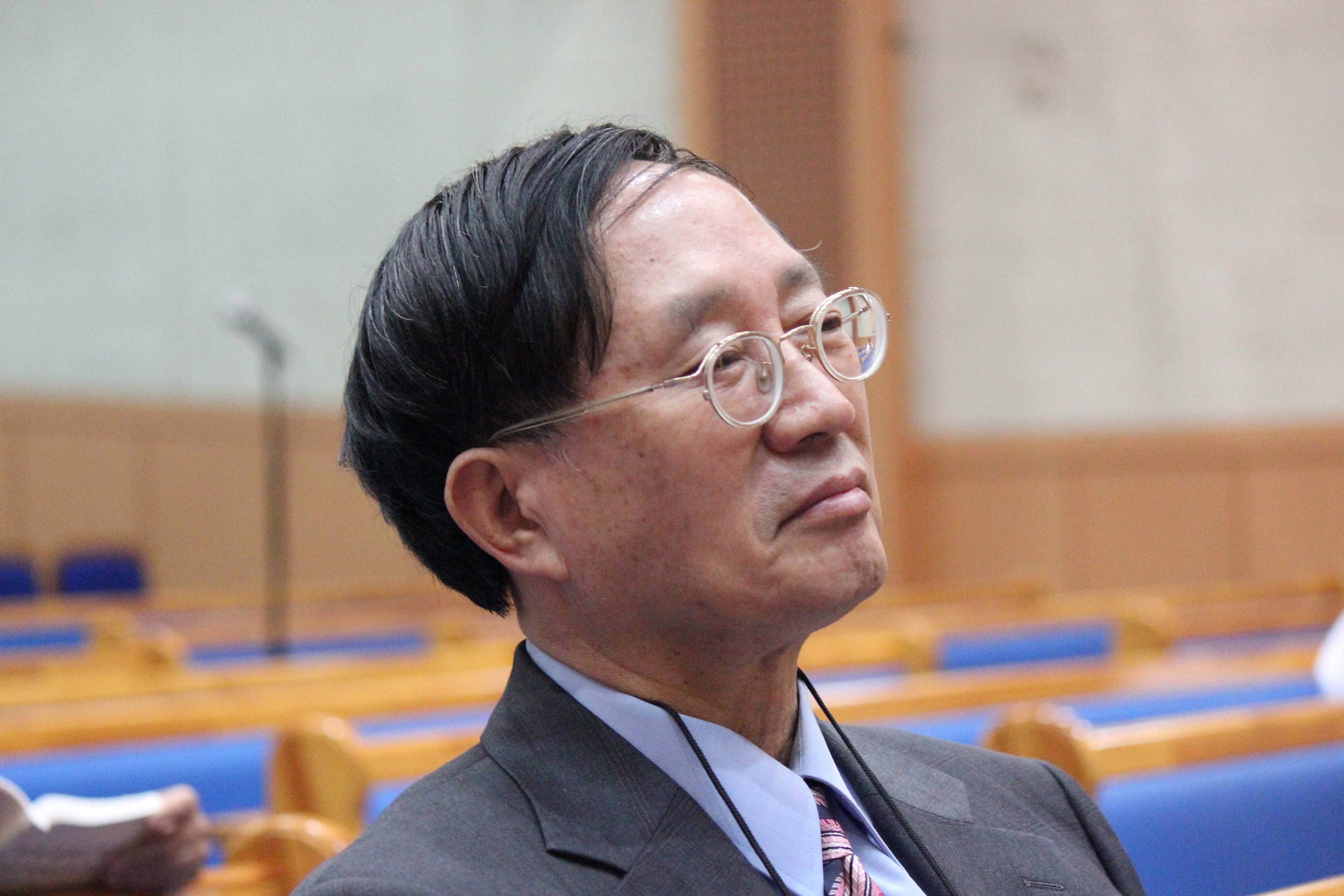 김영한 박사(숭실대학교 교수, 기독교학술원원장)한국개혁신학회모임, 촬영장소. 한영신학대교. 서울